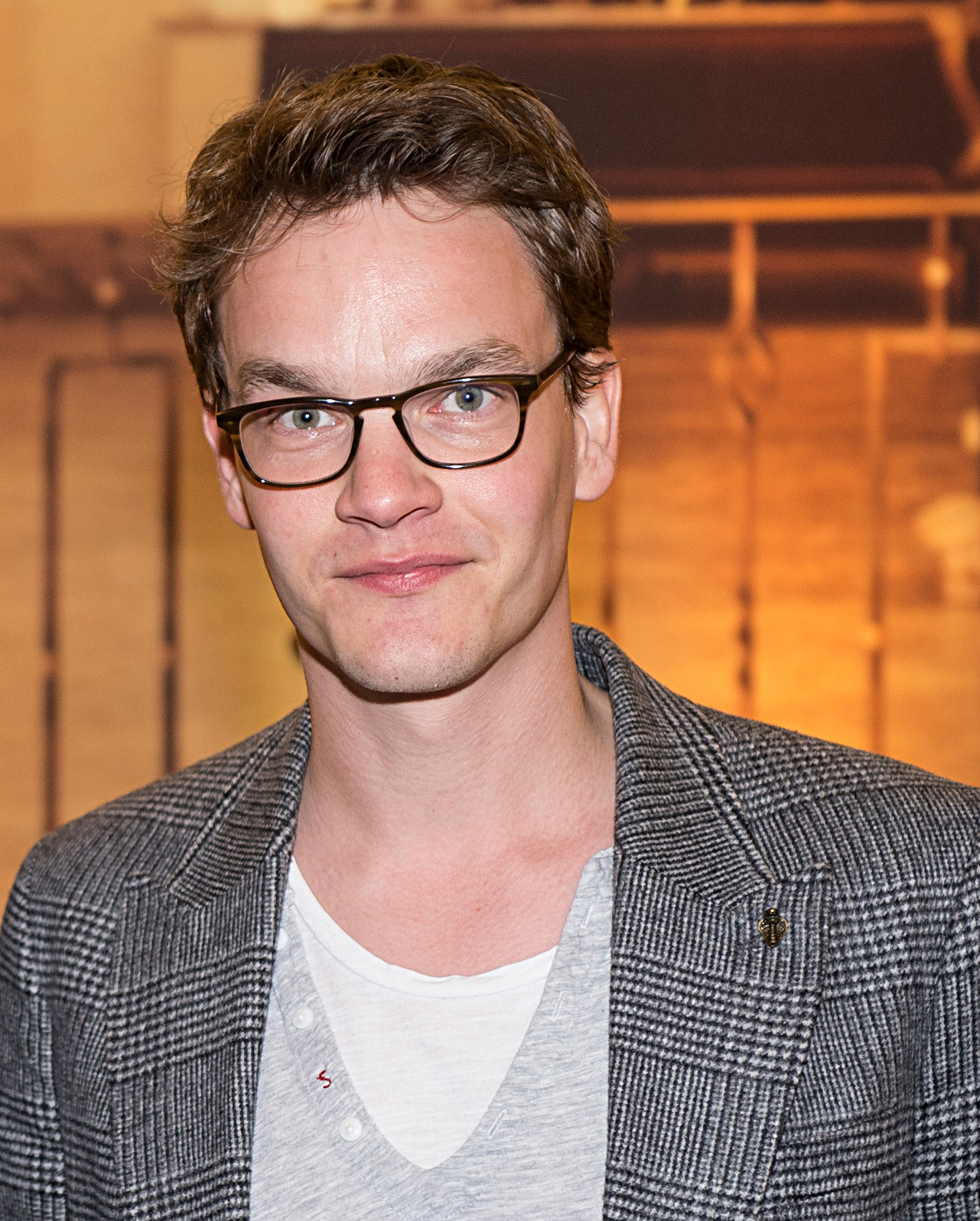 Bretonische Verhältnisse Premiere am 16.04.2014 in München Ludwig Blochberger